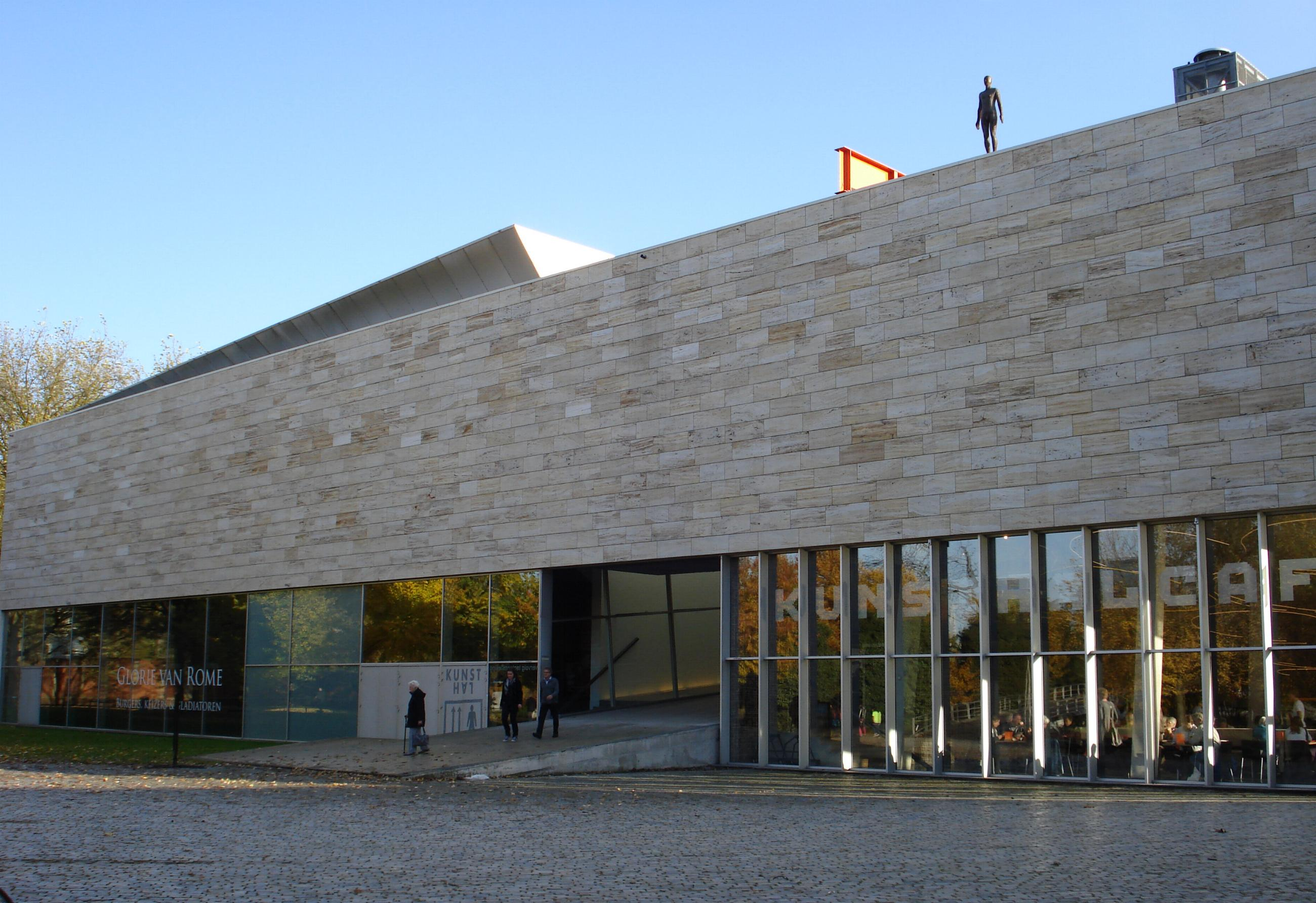 Rotterdam, Kunsthal, achterzijde.